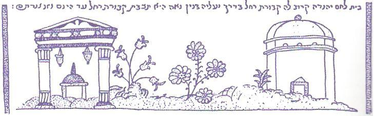 ציור של he:קבר רחל משנת 1598 מתוך כתב יד עברי, איטליה. משמאל מראה פנימי, ומימין הקבר מבחוץ